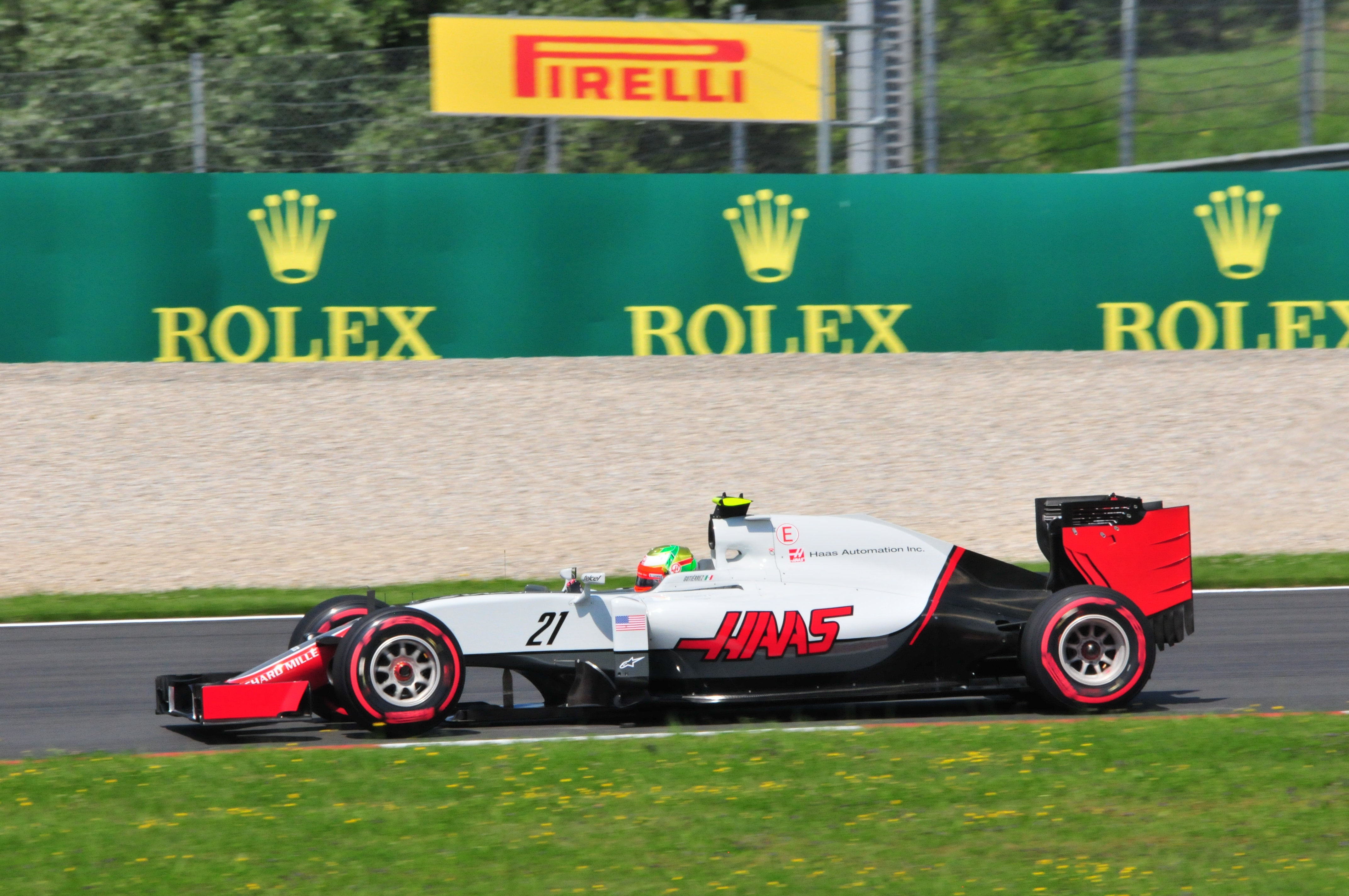 Haas F1 Team #21 Esteban Gutierrez